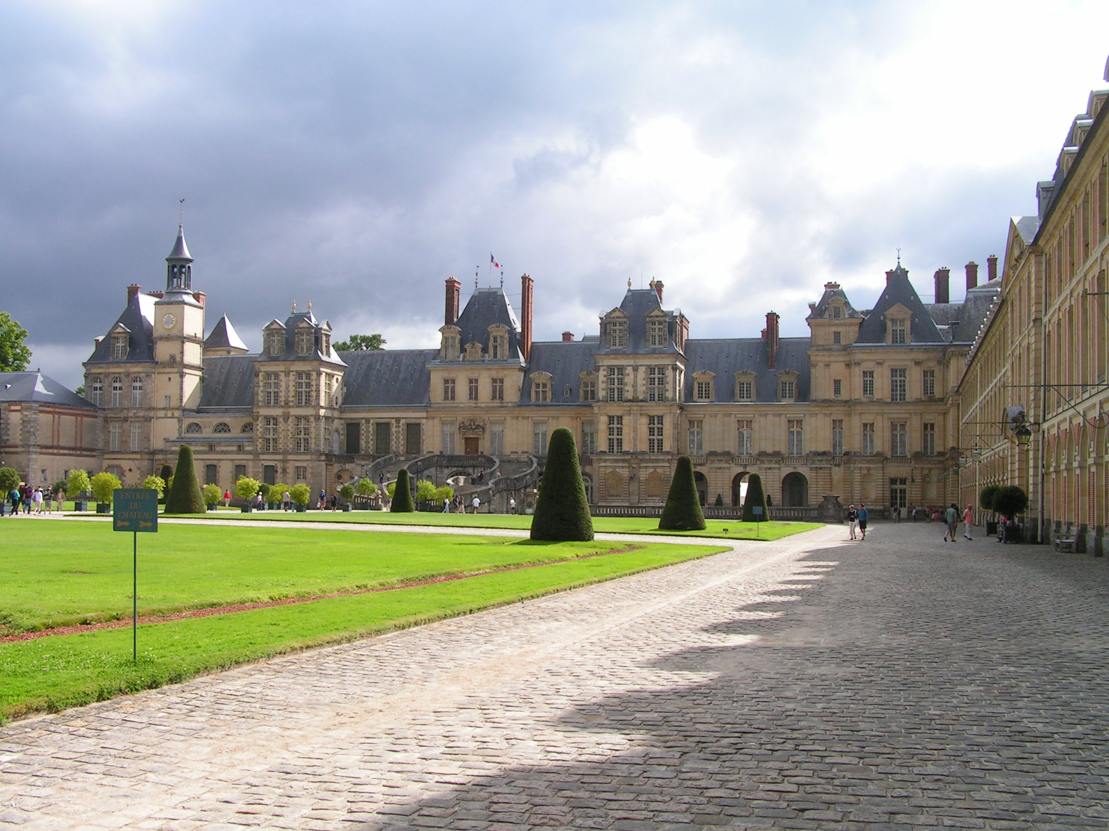 château de Fontainebleau